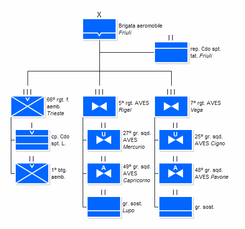 Attuale struttura della Brigata Aeromobile "Friuli"